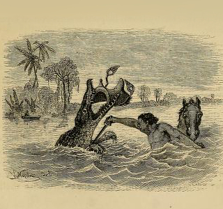 Wild scenes in South America, or, Life in the Llanos of Venezuela Pagina 113, llanero cruzando el rio, matando un caiman.